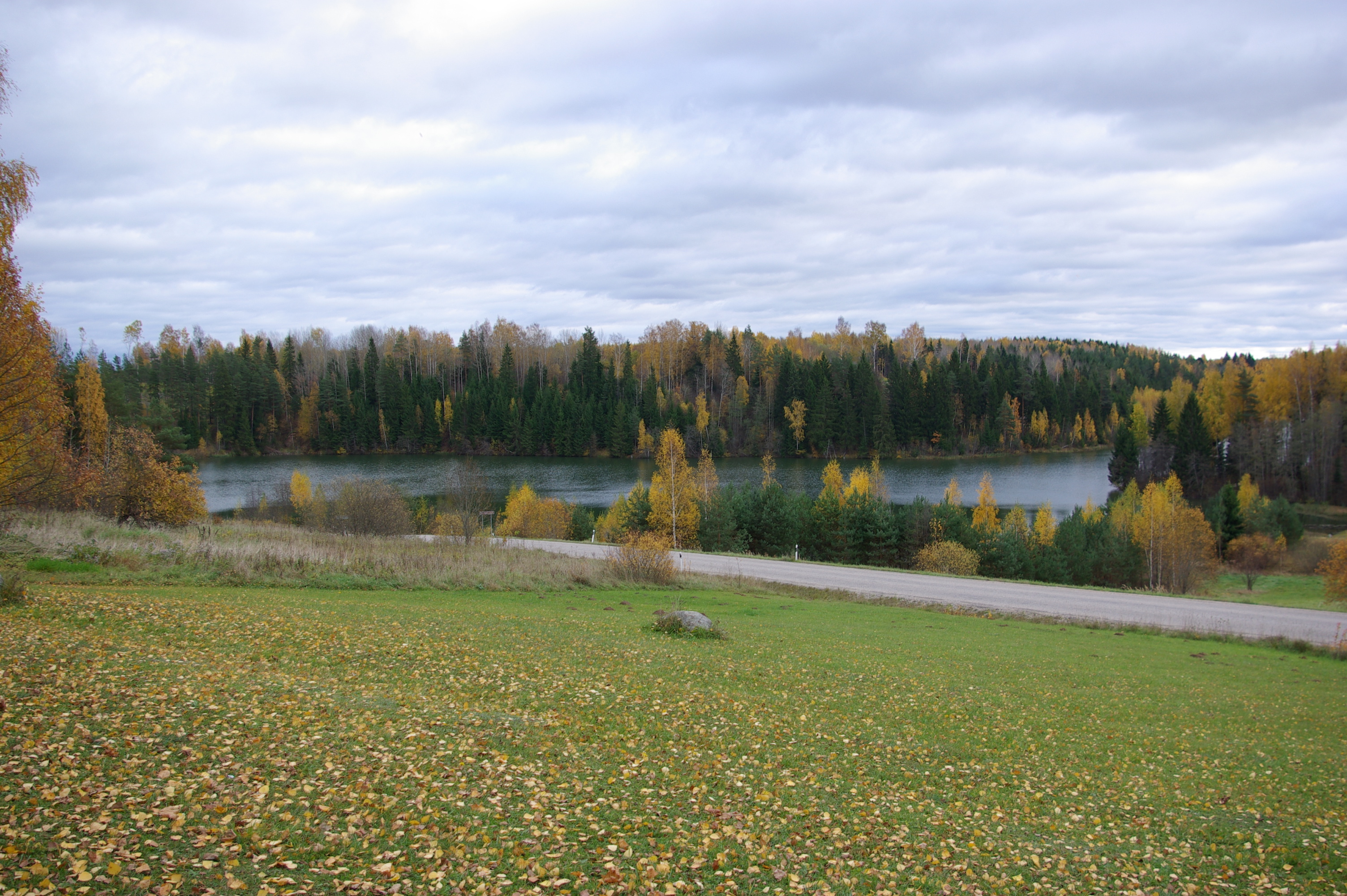 Obinitsa järv